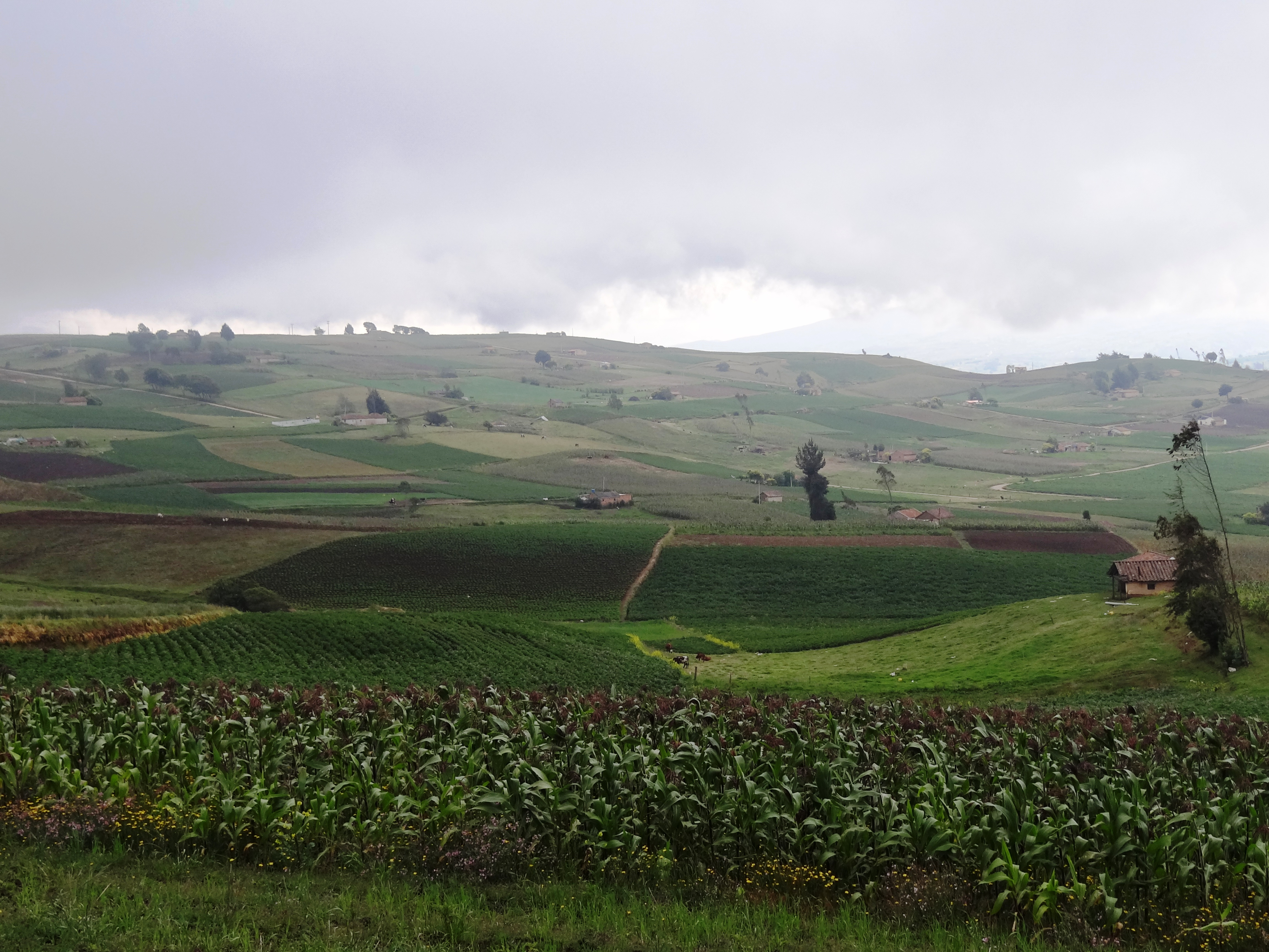 Paraje rural en el municipio de Siachoque, departamento de Boyacá, Colombia